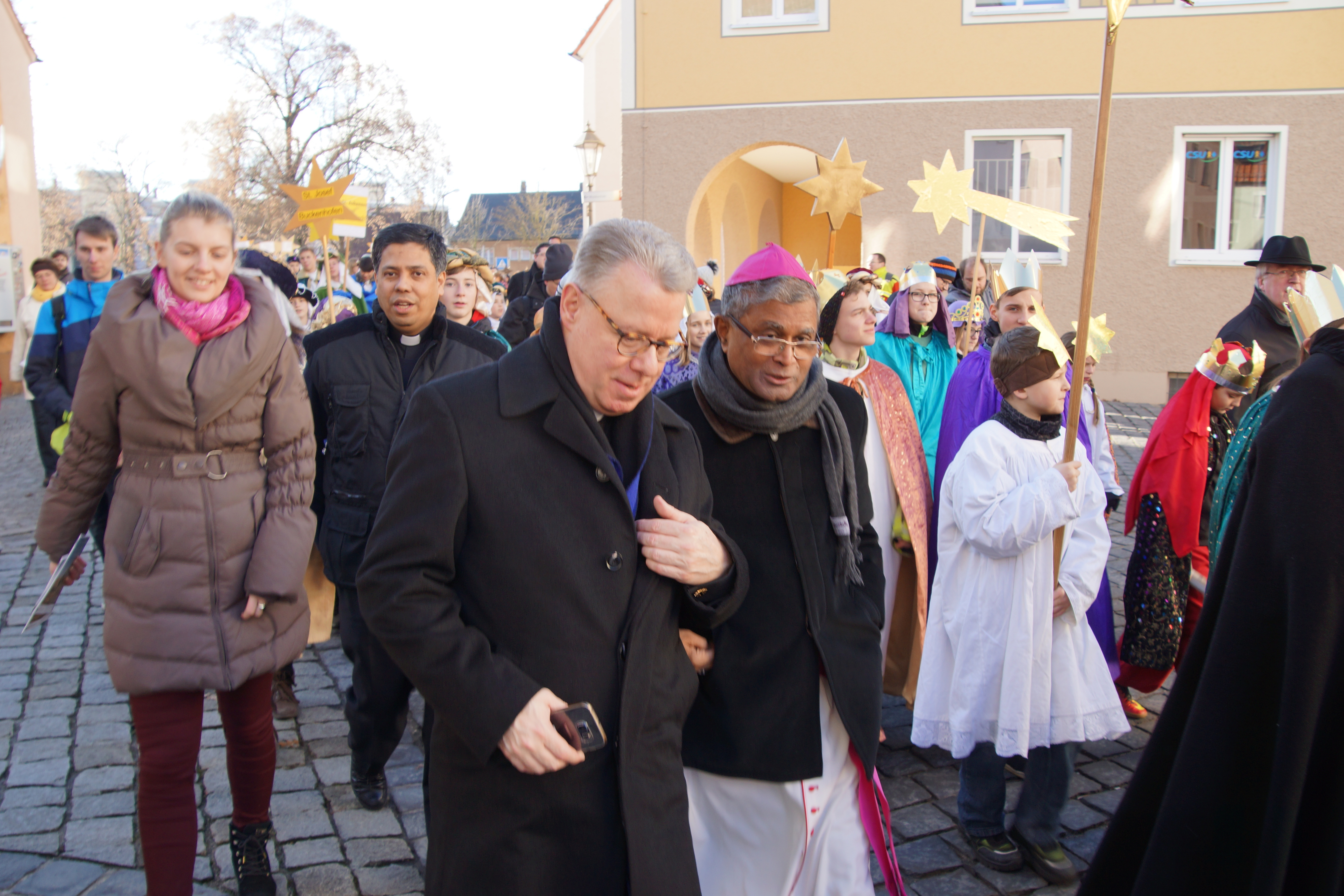 Umzug bei der bundesdeutschen Sternsingeraussendung am 29 Dezember in Neumarkt